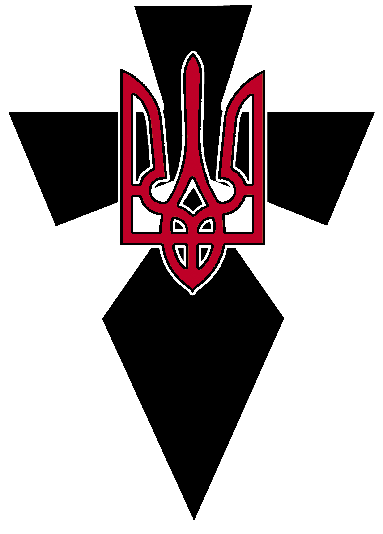 Тризуб, герб, символ, Тризуб Бандери